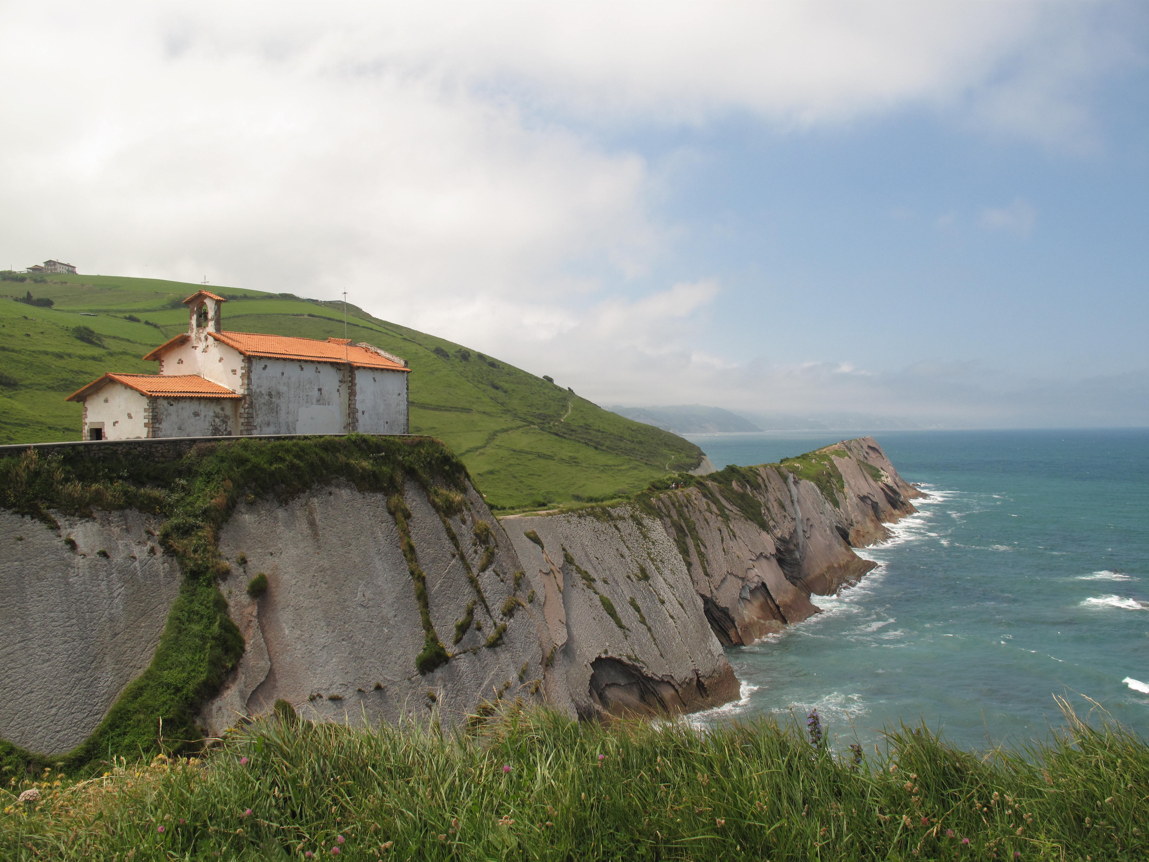 Ermita de San Telmo en Zumaia (Guipúzcoa)